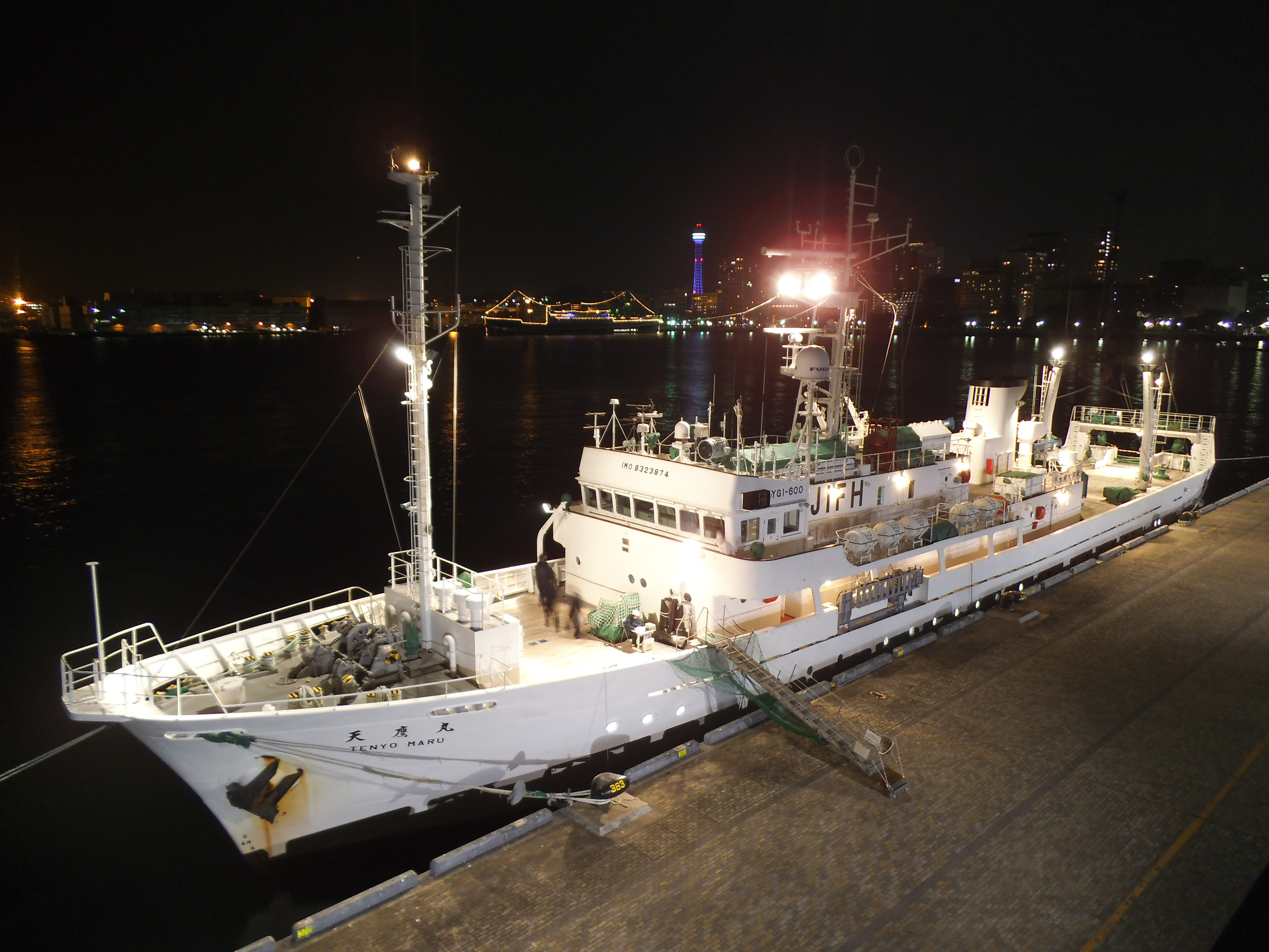 水産大学校の練習船兼海洋調査船天鷹丸(3代目） 大さん橋にて前から